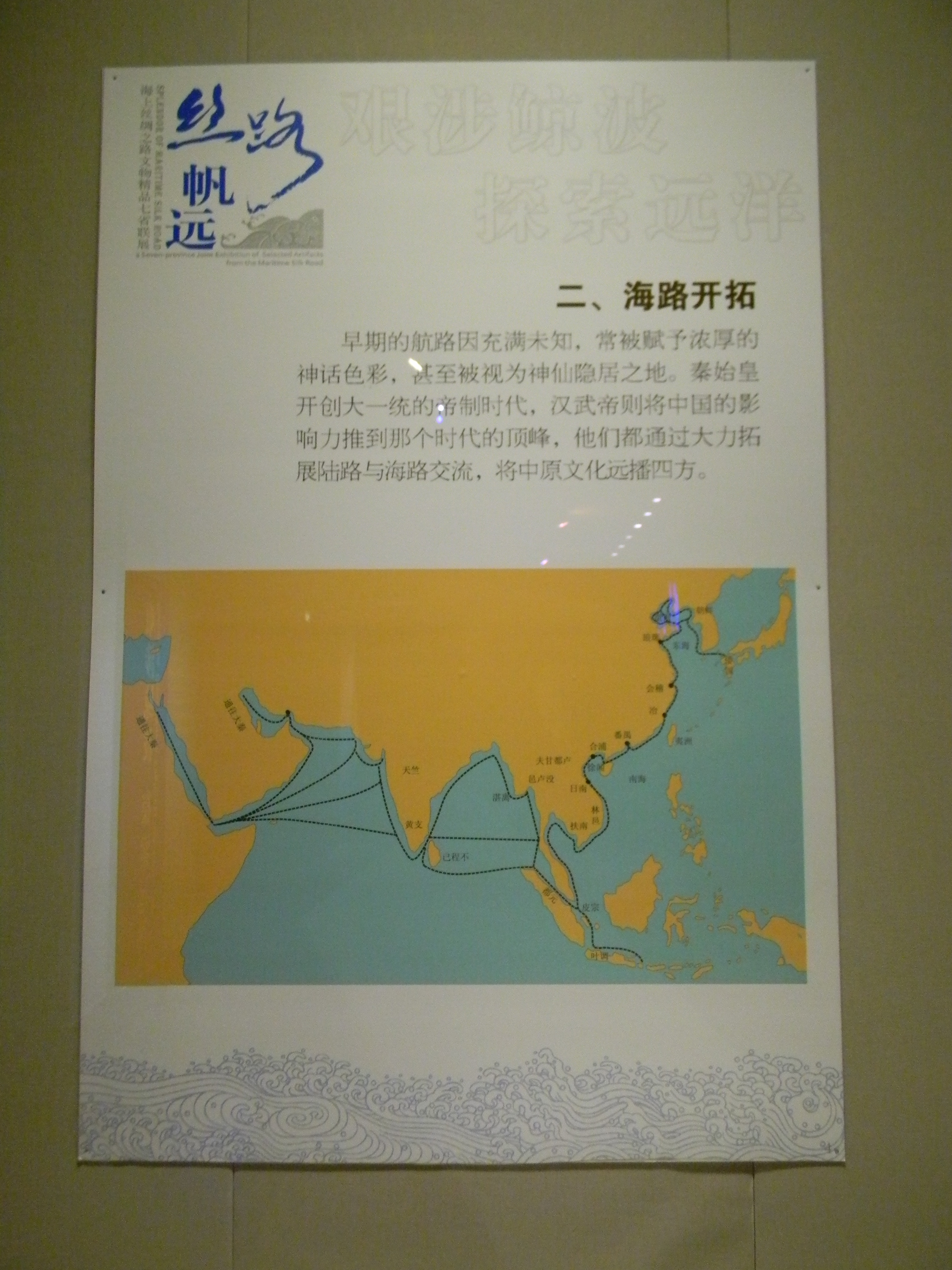 丝路帆远·海上丝绸之路文物精品七省联展介绍板“二、海陆开拓”，摄于福建博物院